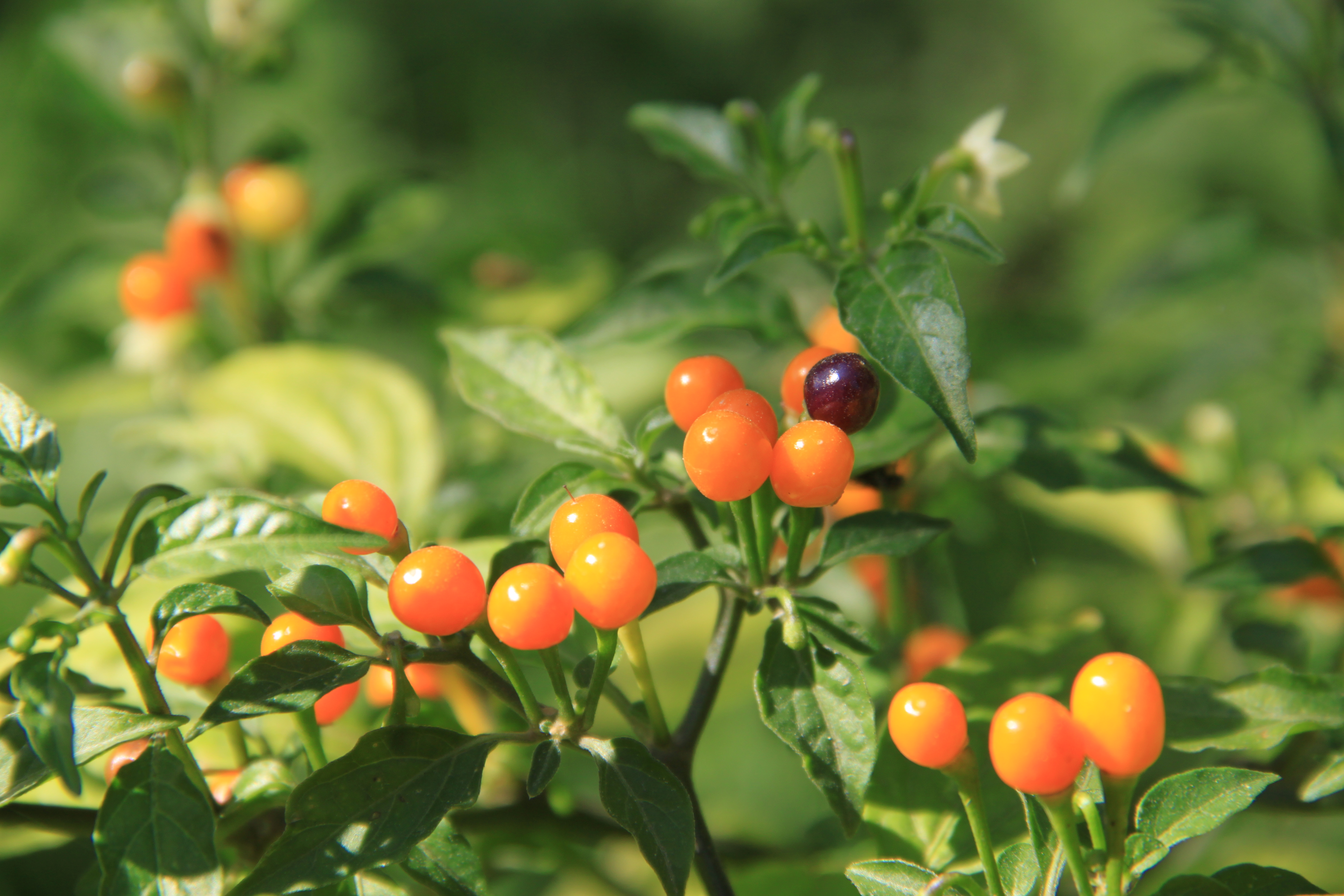 Muséum de Toulouse Native nameMuséum de ToulouseLocationToulouse, FranceCoordinates43° 35′ 37.89″ N, 1° 26′ 57.42″ E Established1796: established ; 1865: opened to publicWeb page control : Q422 VIAF: 130895847 ISNI: 0000 0001 2158 3469 SUDOC: 028667107 BNF: 120455376 Museofile: M7013 institution QS:P195,Q422